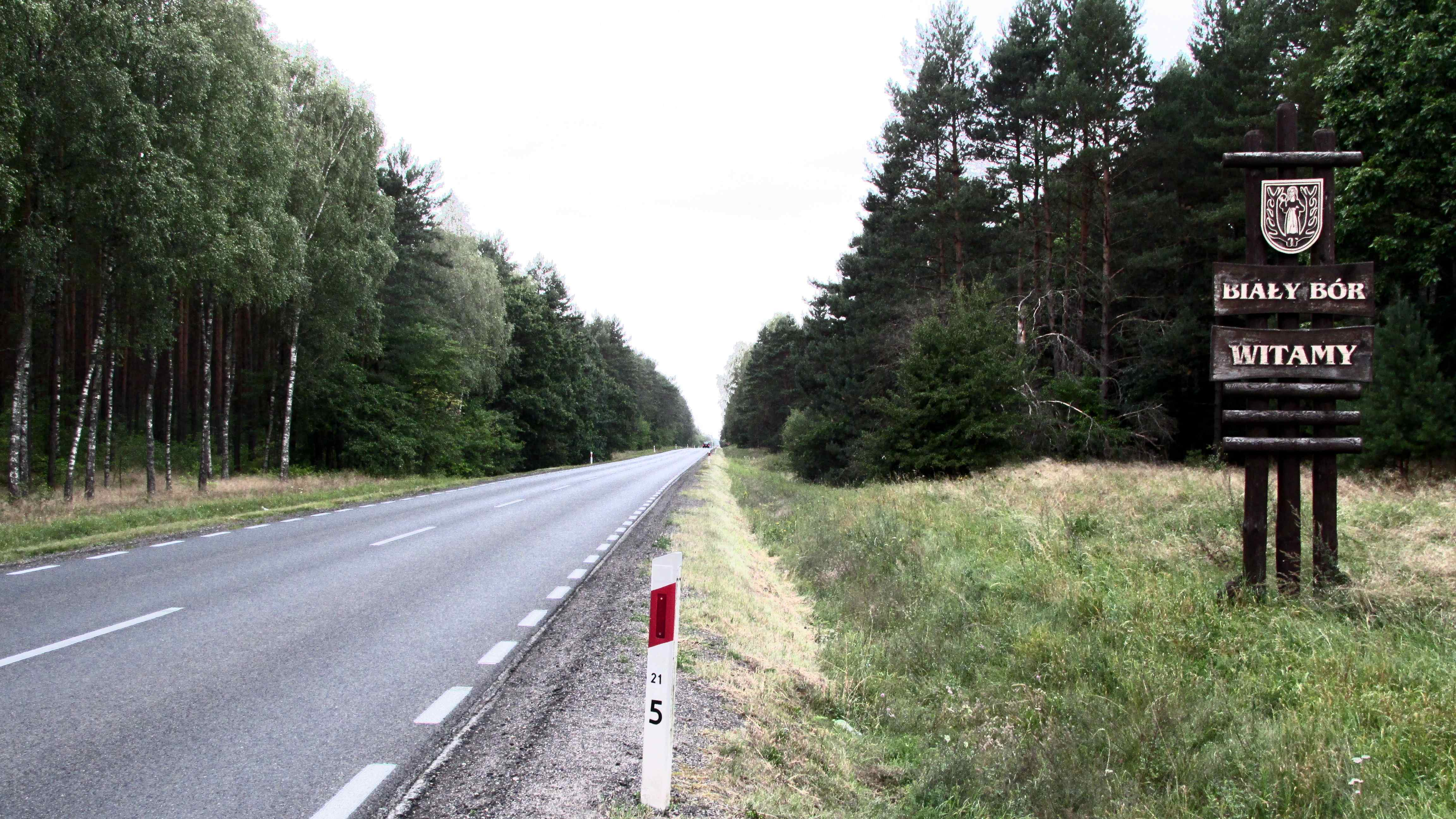 Powitalna tablica przy wjeździe do Białego Boru w woj. zachodniopomorskim.